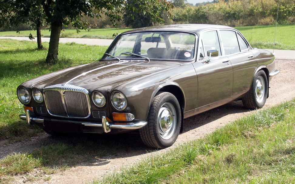 Bildbeschreibung: Daimler Sovereign 4,2 mit kurzem Radstand Baujahr 12/1972 Fotograf/Zeichner: GvA Datum: 01.10.2005 Sonstiges: weitere Bilder von diesem Fahrzeug gerne auf Anfrage!